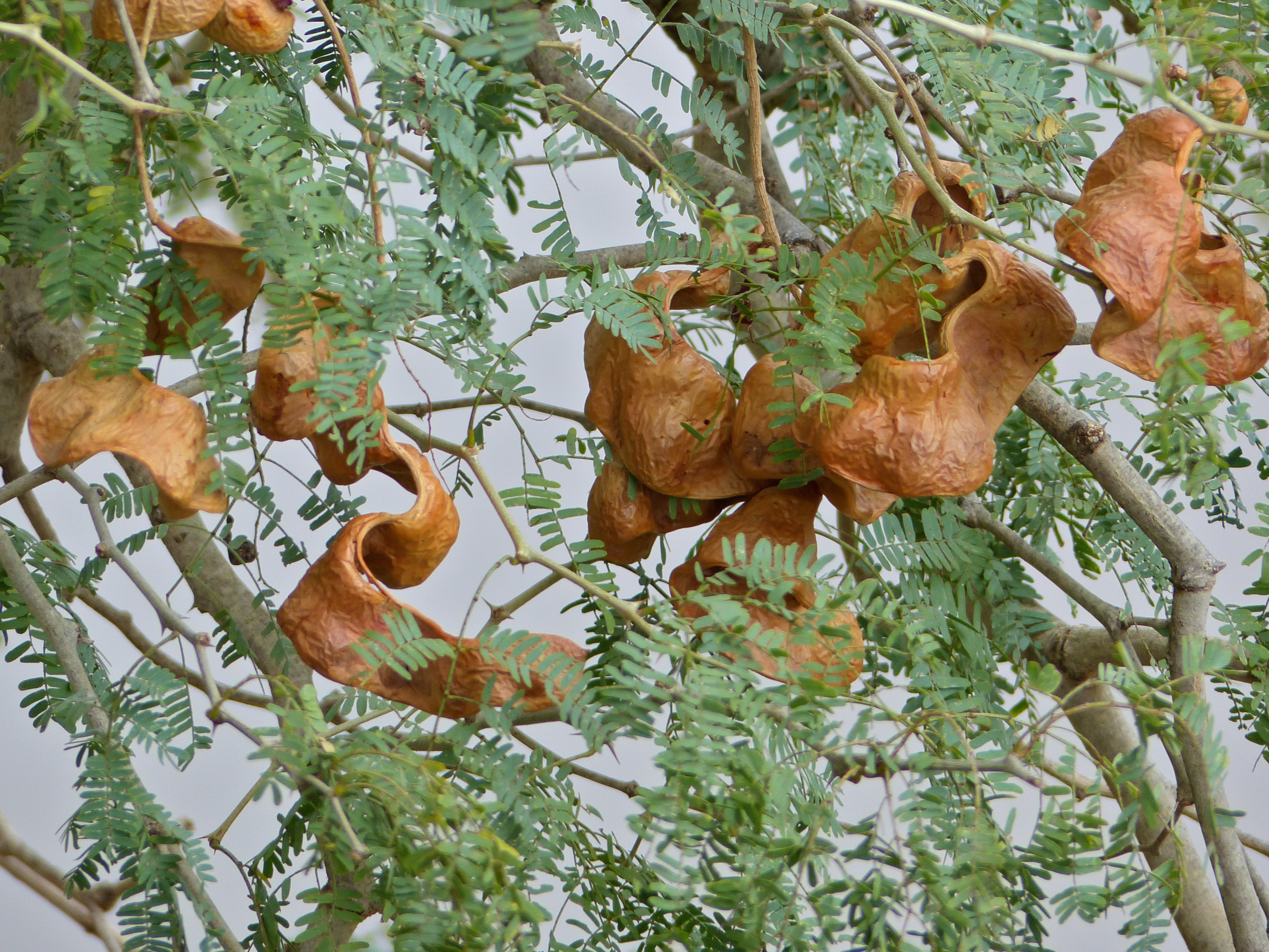 S63 Road, Pafuri area, Kruger NP, SOUTH AFRICA